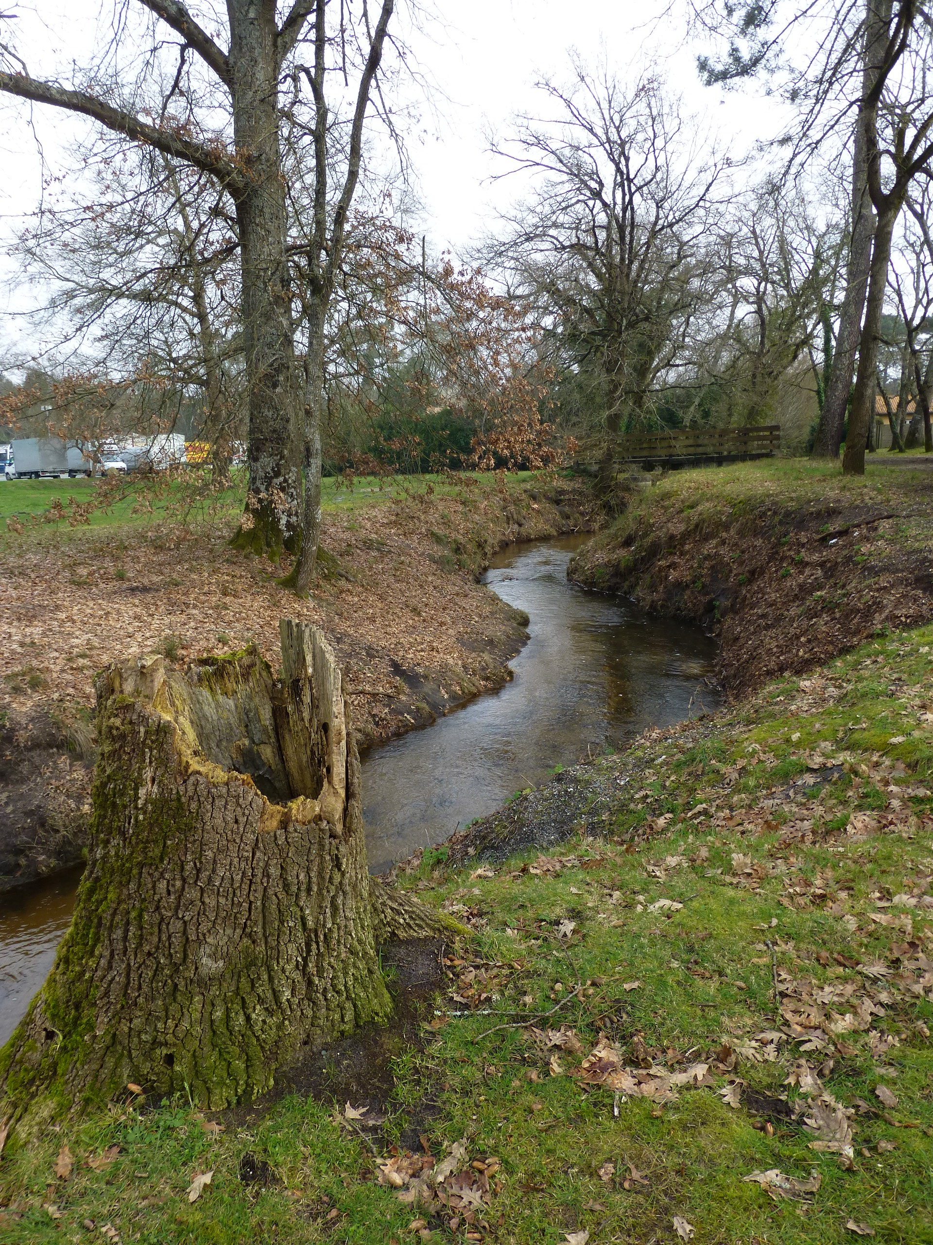 Aire de service A63, Bordeaux-Cestas : ruisseau dans la chêneraie.